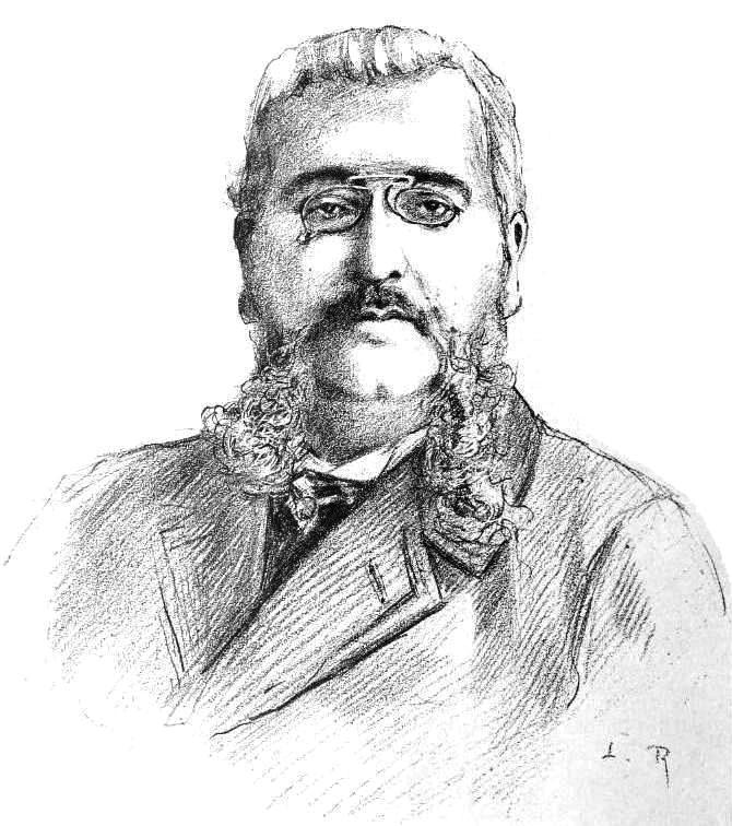 "Un ami de la justice, M. Francis de Pressensé."